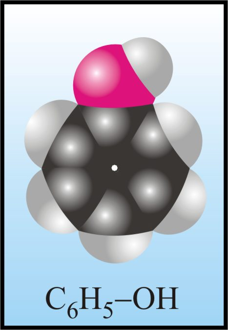 phenol model